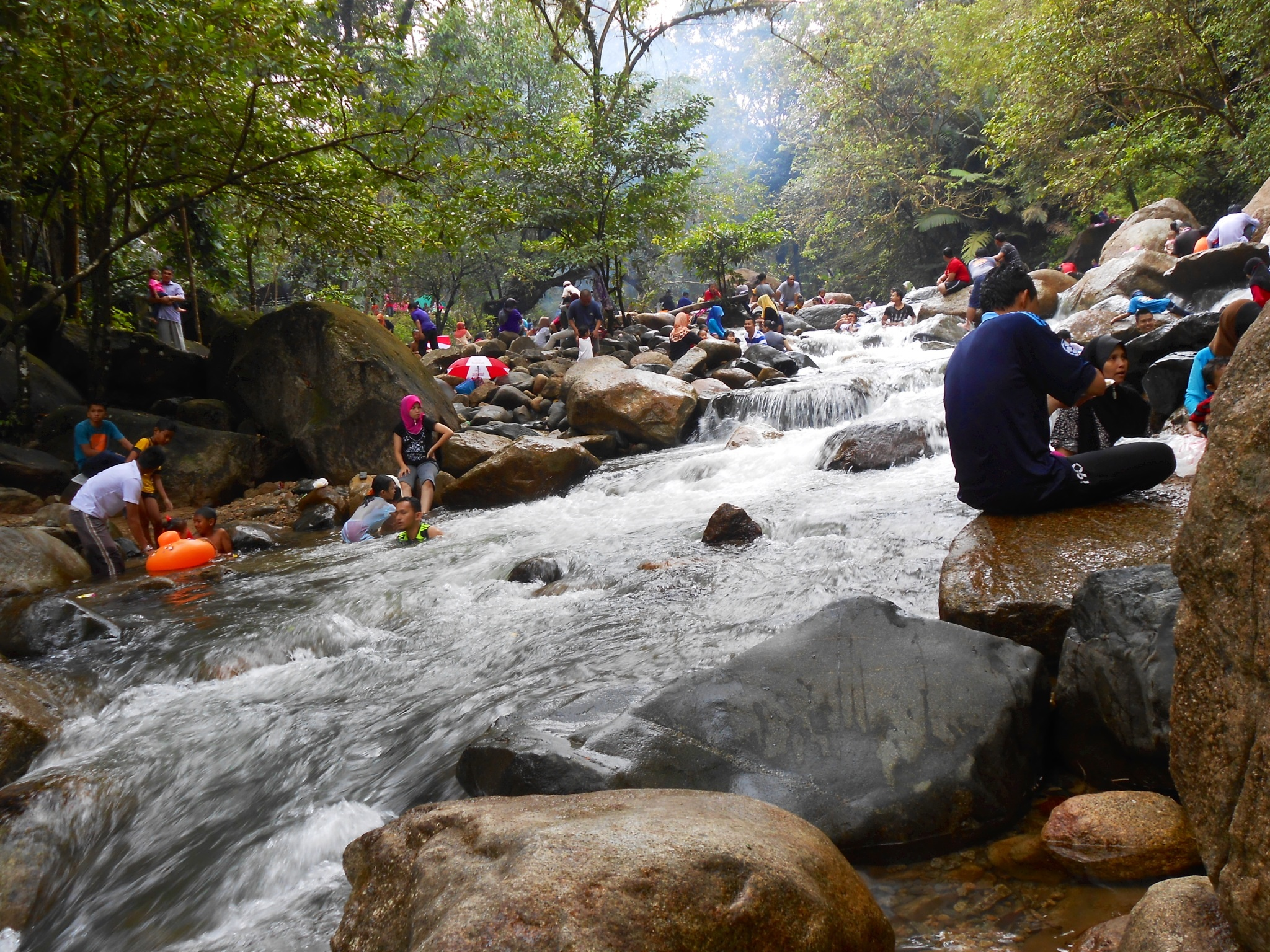 Sekayu Waterfall